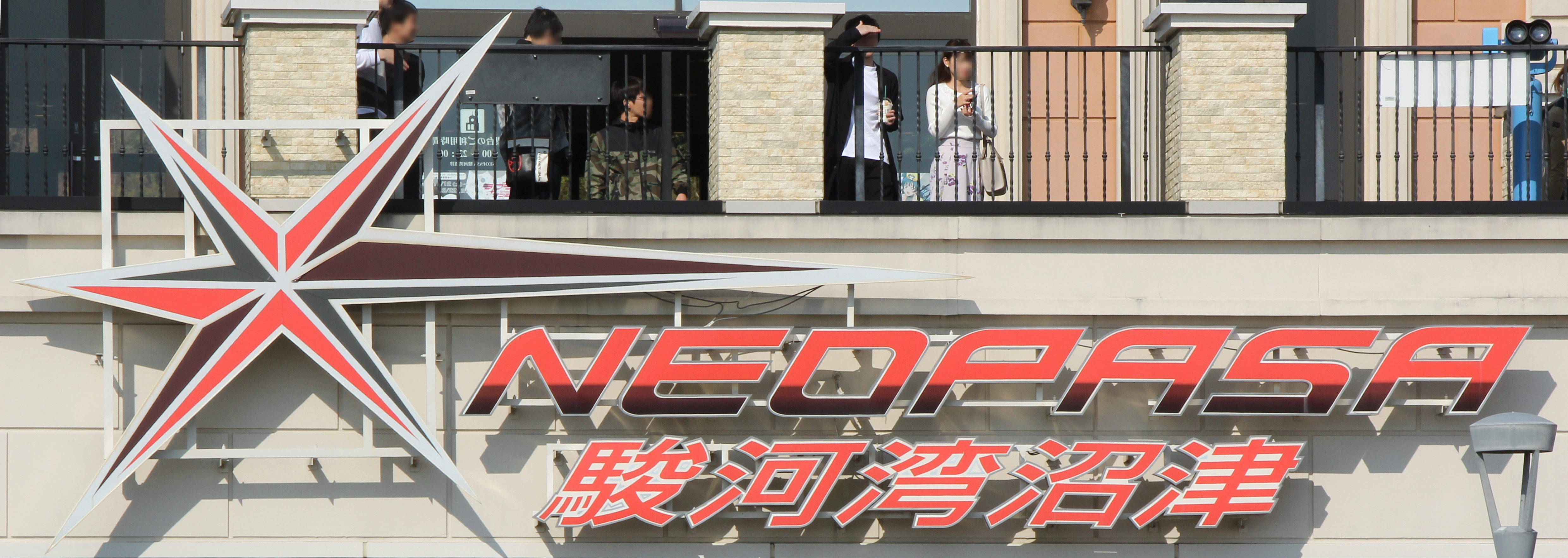 E1A新東名高速道路のSA、PAのブランド「NEOPASA」のロゴマーク